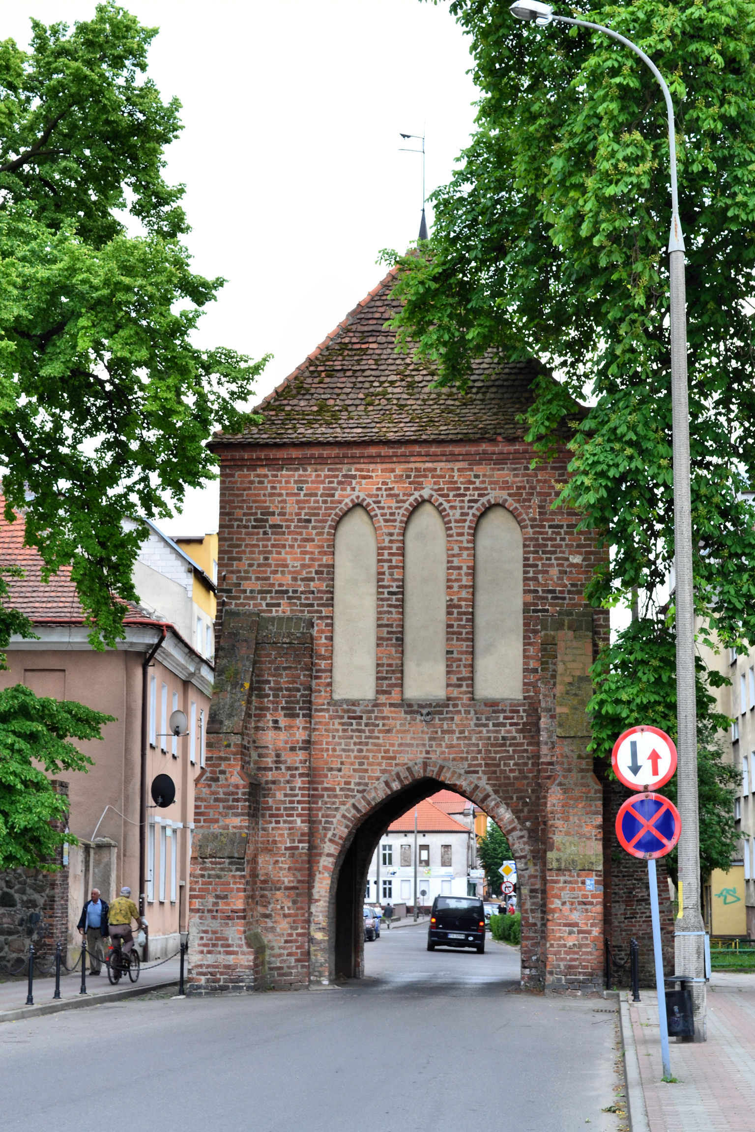 Myślibórz - Brama Pyrzycka